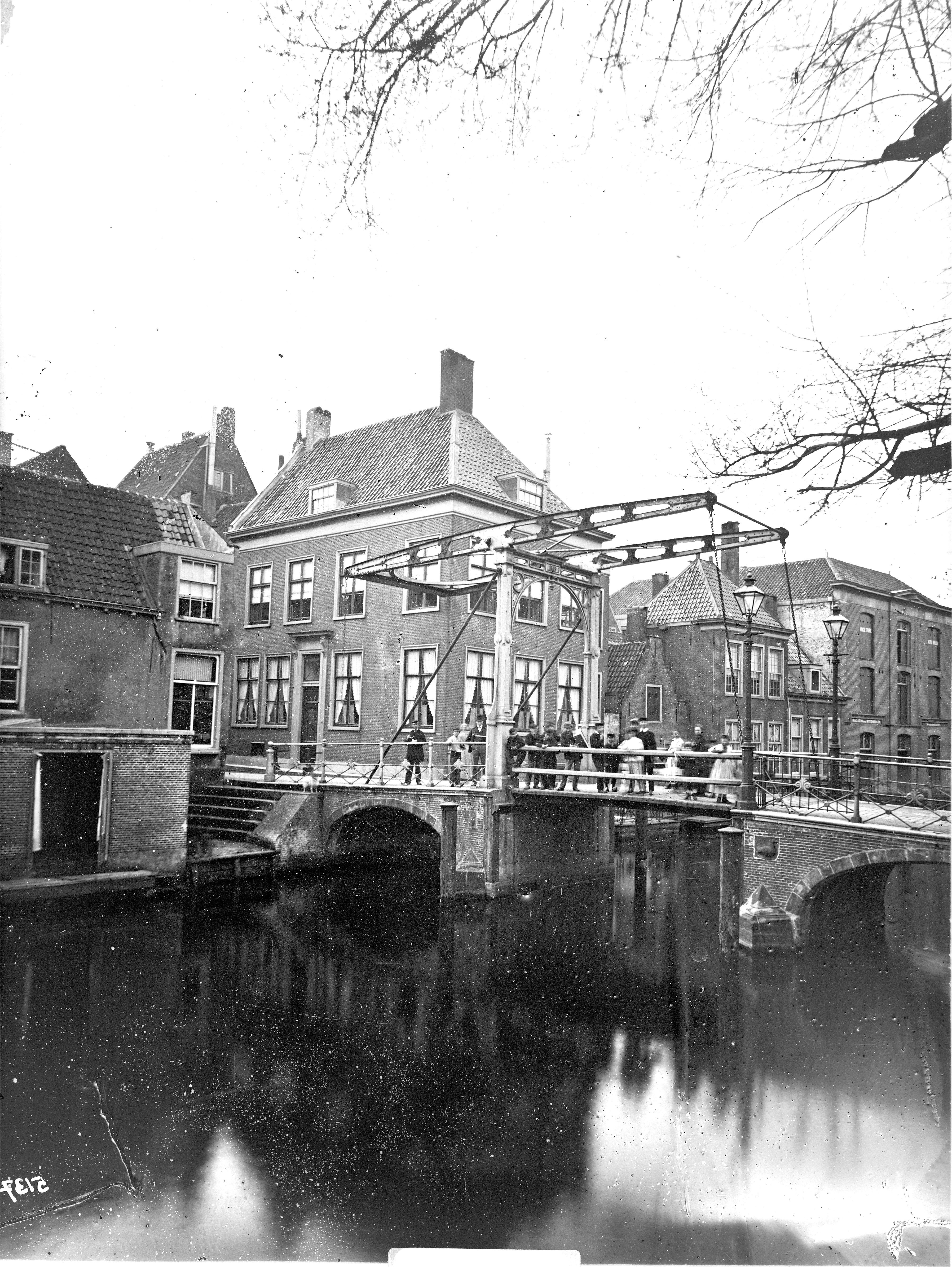 Gezicht op de Gansoordbrug over de Nieuwe Rijn bij de Watersteeg, gezien naar het westen. Op de voorgrond de Nieuwe Rijn.